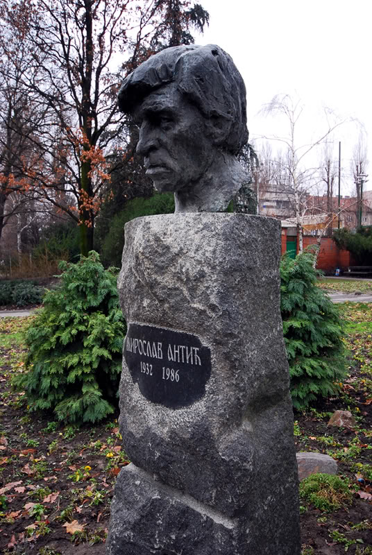 Spomenik Miroslavu Antiću u novosadskom Dunavskom parku